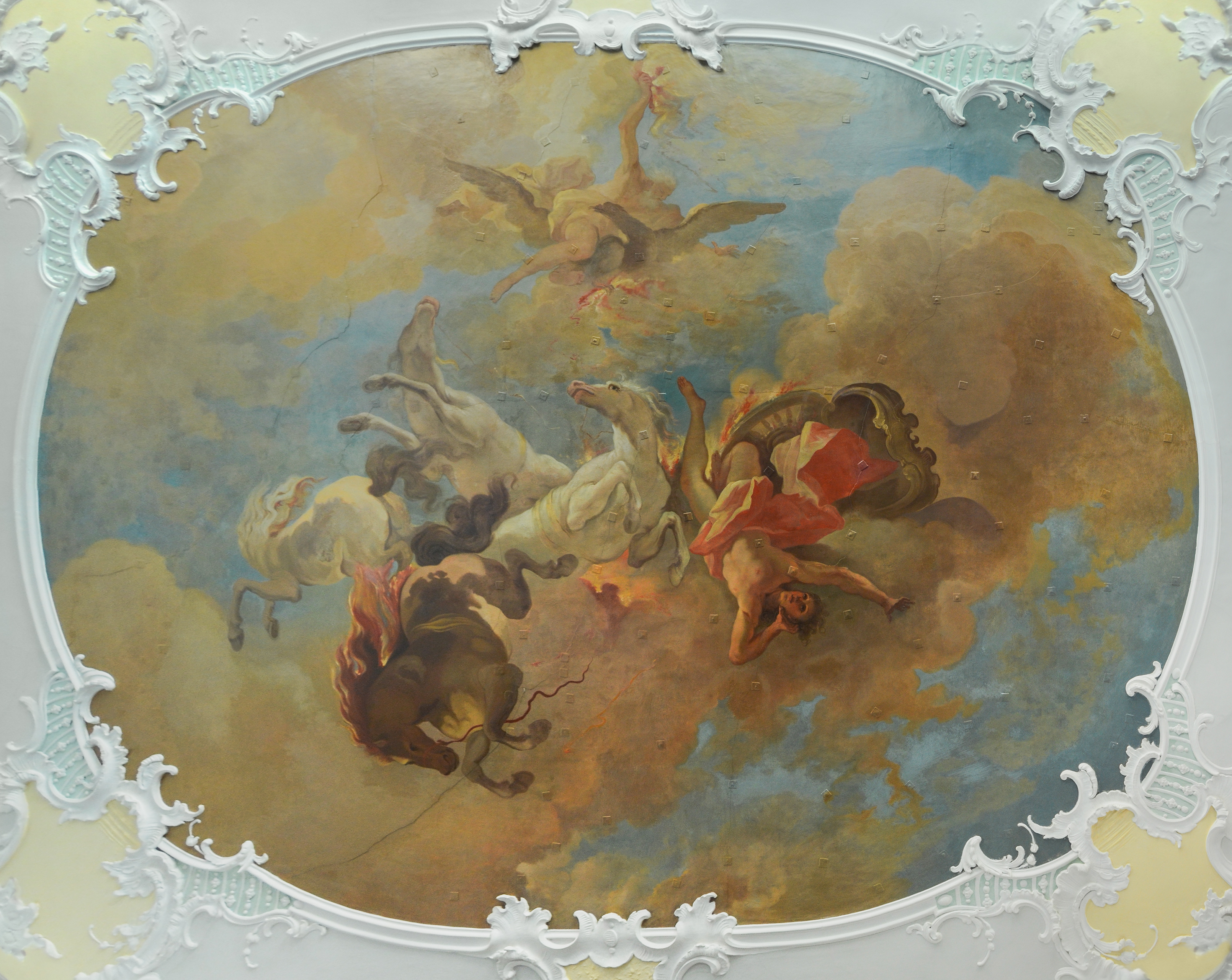 Ponikauhaus - Festsaal (Allegorien, Mittelbild) - Treppenhaus (Sturz des Phaeton)